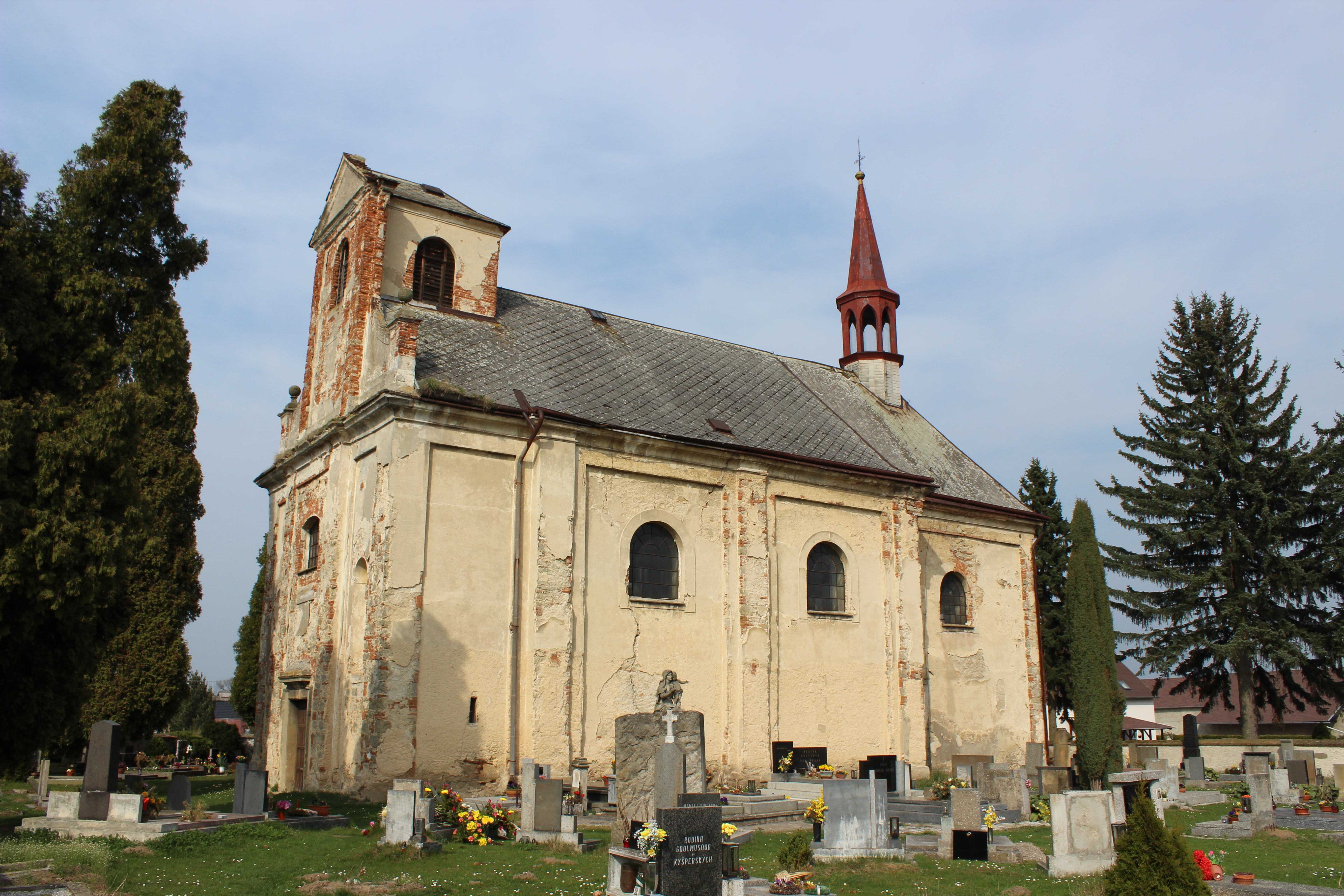 Kostel svatého Vavřince v Čisté (pohled od jihozápadu). This photograph was taken with a Canon EOS 600D.